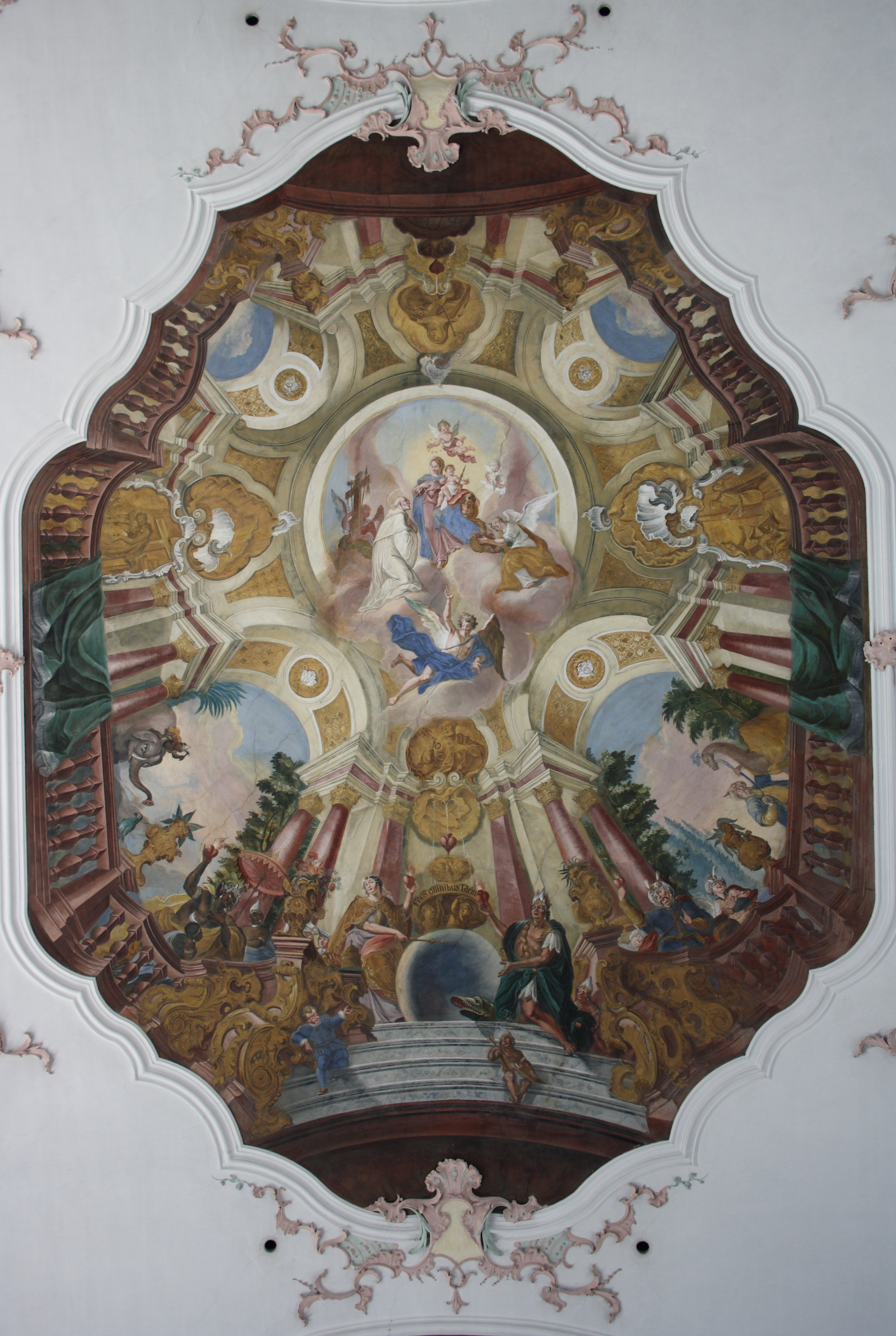 Katholische Pfarrkirche St. Peter in Tapfheim im Landkreis Donau-Ries (Bayern), Deckenfresko im Langhaus, um 1750, von Anton Enderle (1700-1761), mit Signatur: Ant. Enderle pin.; Darstellung: Verehrung Mariens durch die vier Erdteile, Lactatio des hl. Bernhard von Clairvaux